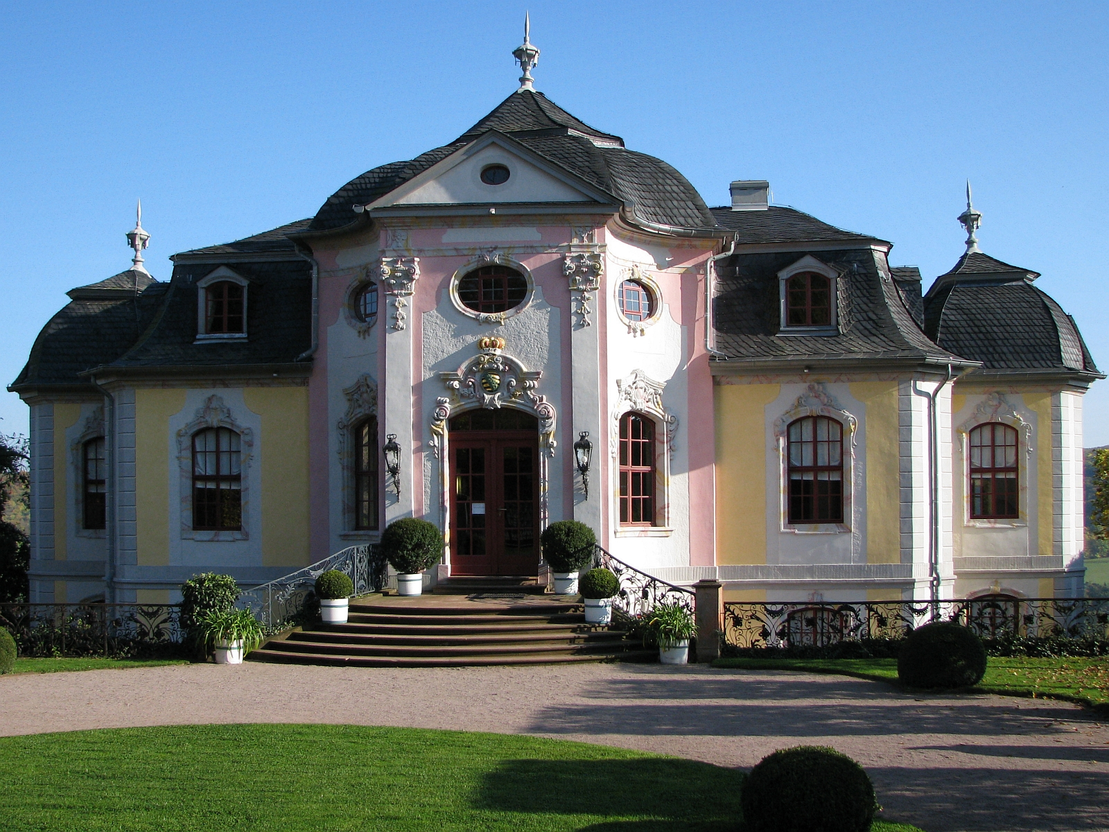 Dornburg an der Saale Dornburger Schlösser Rokokoschloss Gartenseite Foto 2008 Wolfgang Pehlemann Wiesbaden IMG_0202